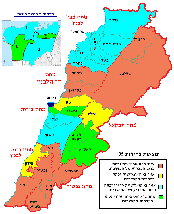 תוצאות הבחירות בלבנון ב-2005 על פי חלוקה לנפות